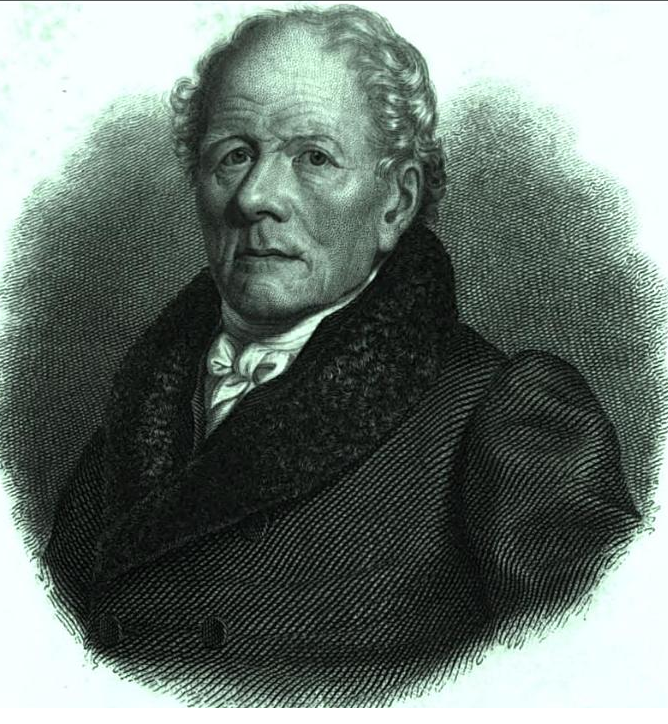 Biographie des Doctor Friedrich Wilhelm von Hoven